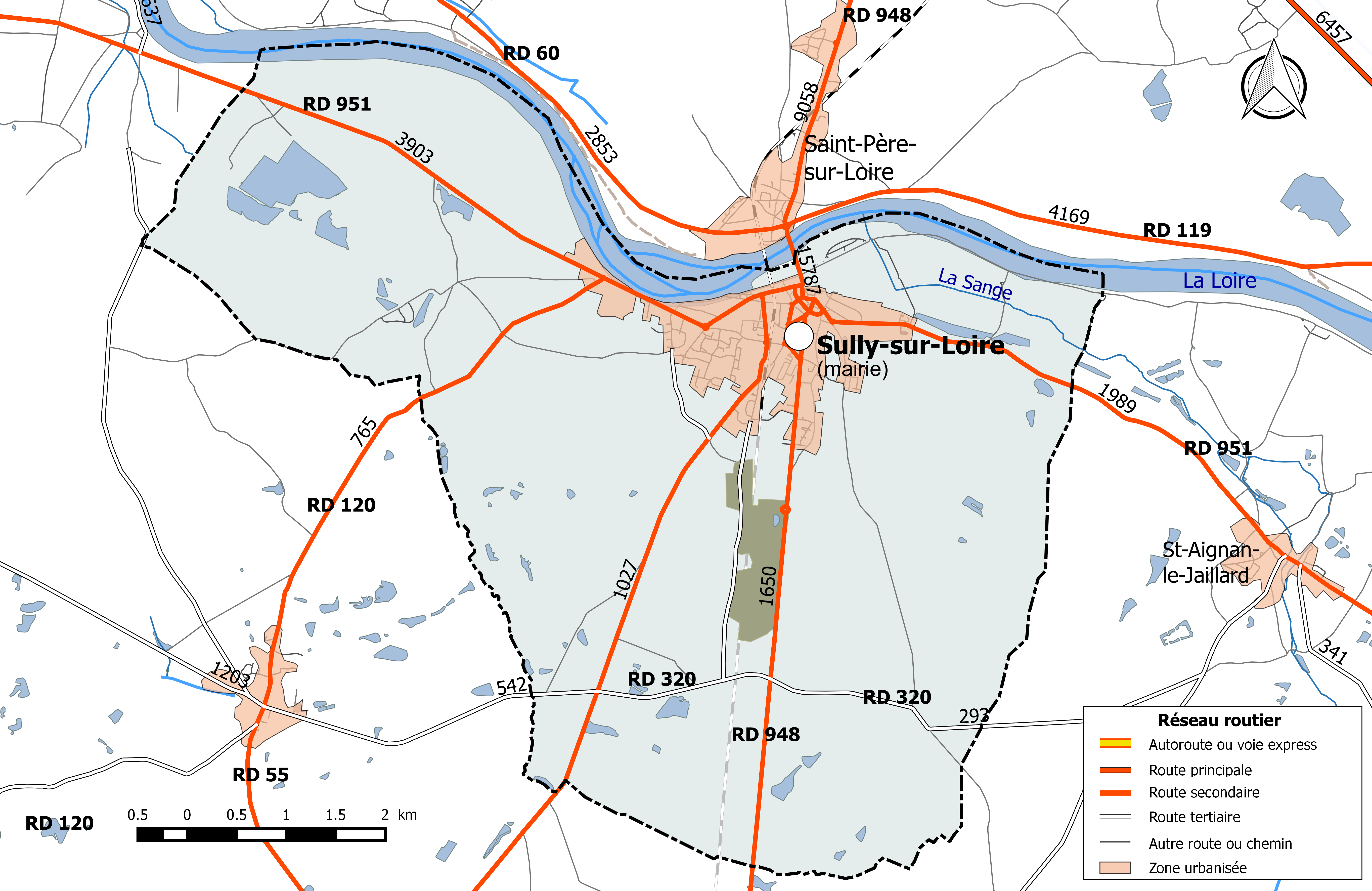 Carte du réseau routier de la commune de Sully-sur-Loire.